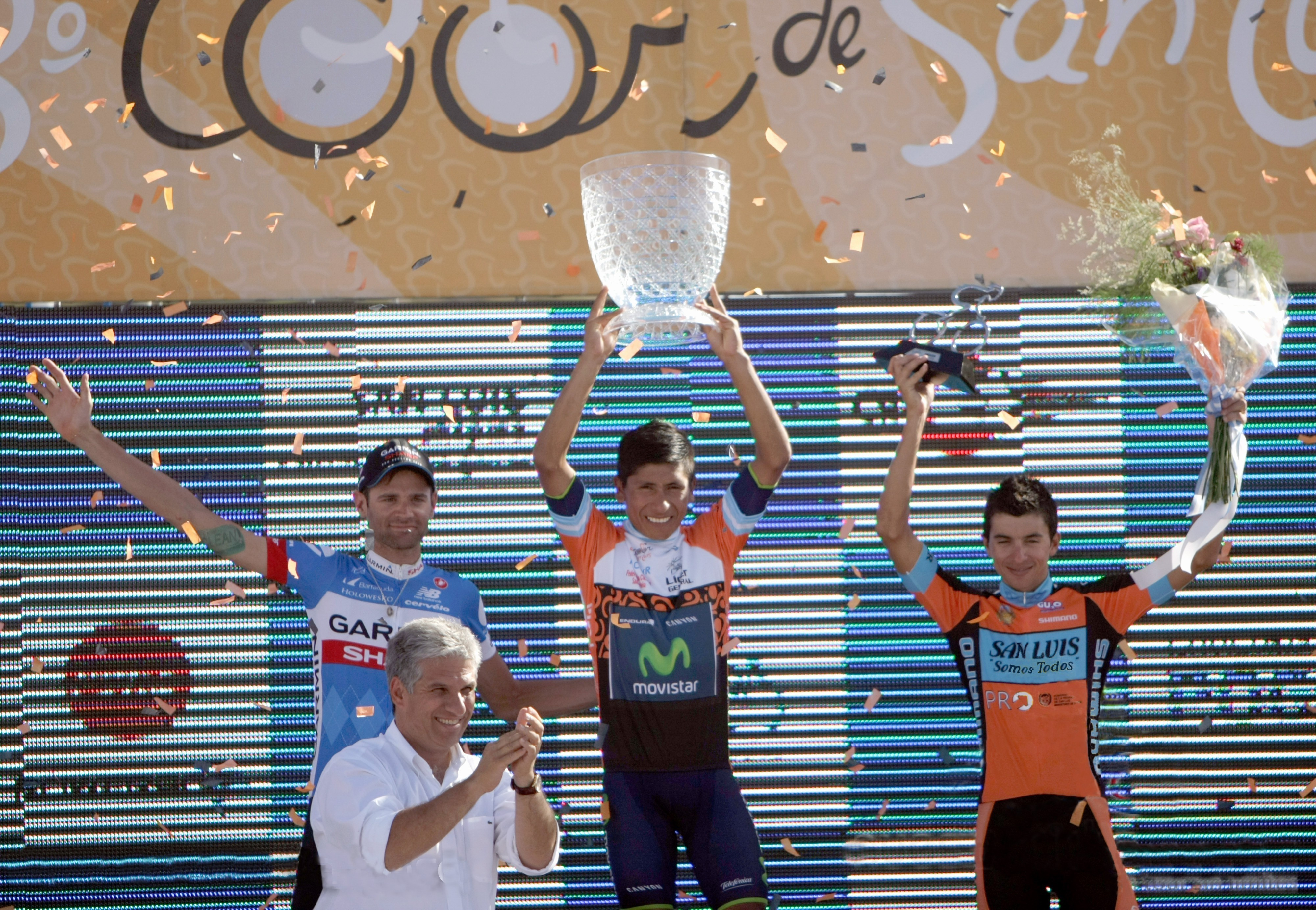 Podio final del Tour de San Luis 2014